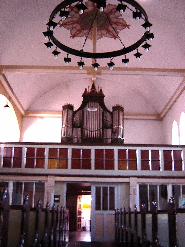 Reformationskirche in Magdeburg-Rothensee (Innenraum nach Osten)